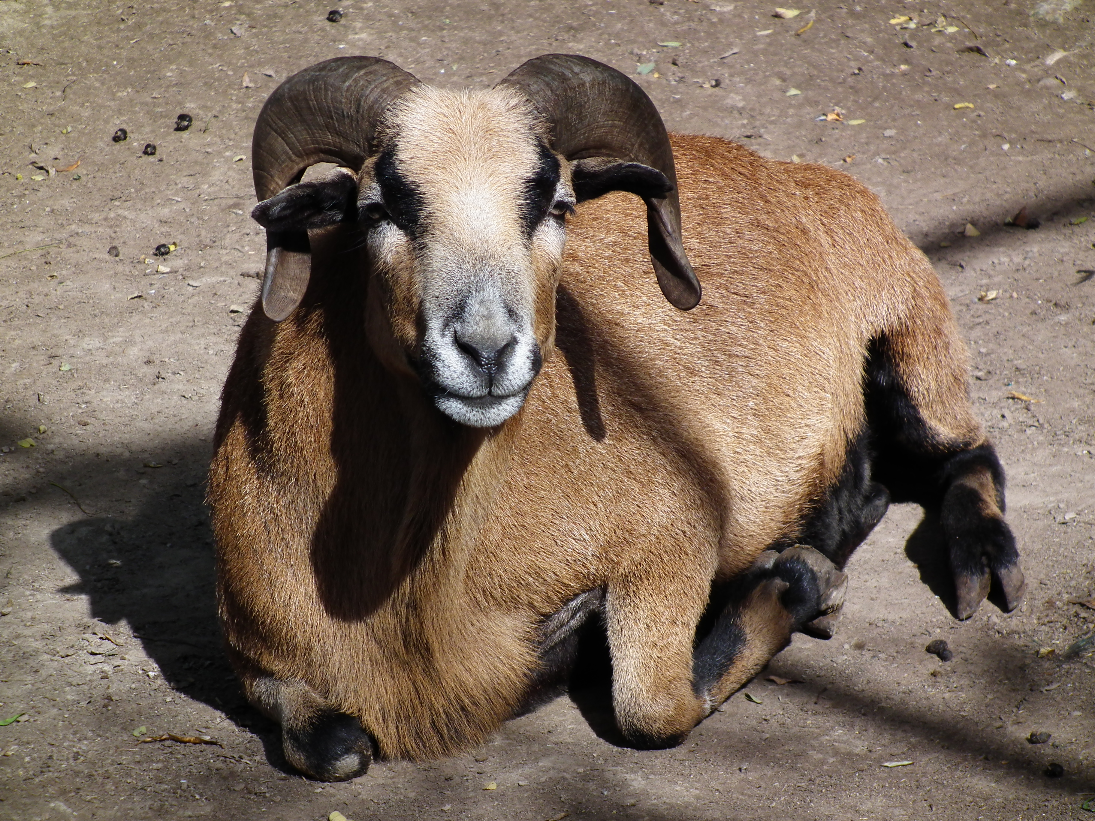 Kamerunschaf (Ovis orientalis f. aries) im Leintalzoo in Schwaigern (Baden-Württemberg, Deutschland)